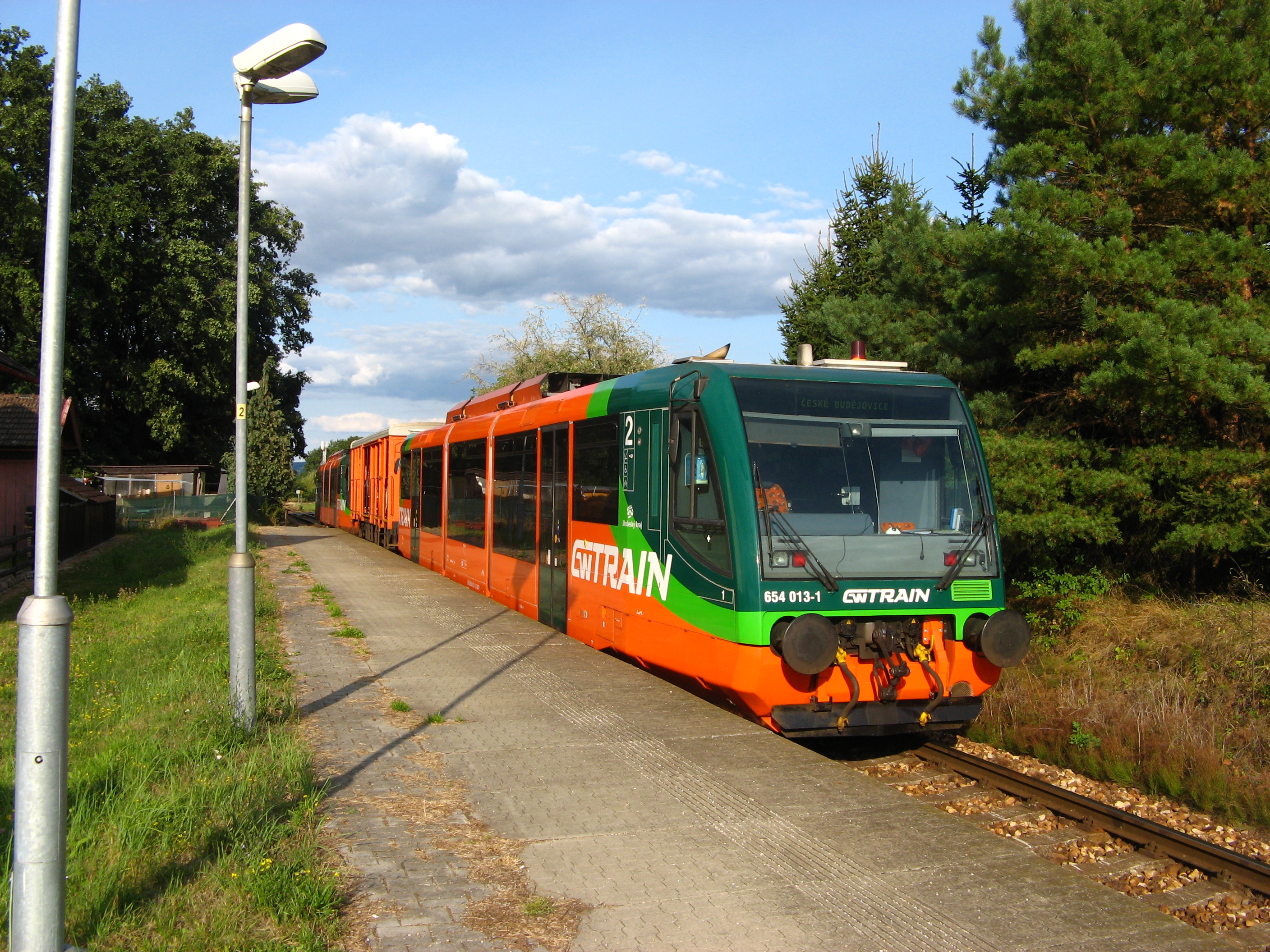 Motorový vůz německé řady 654 (RegioSprinter, zvaný též podle tvaru a nátěru mrkev) v zastávce Černý Dub na trati 194